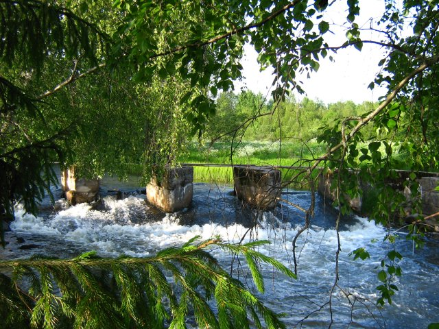 Vasilievo. Leningrad oblast, Priozersk region.